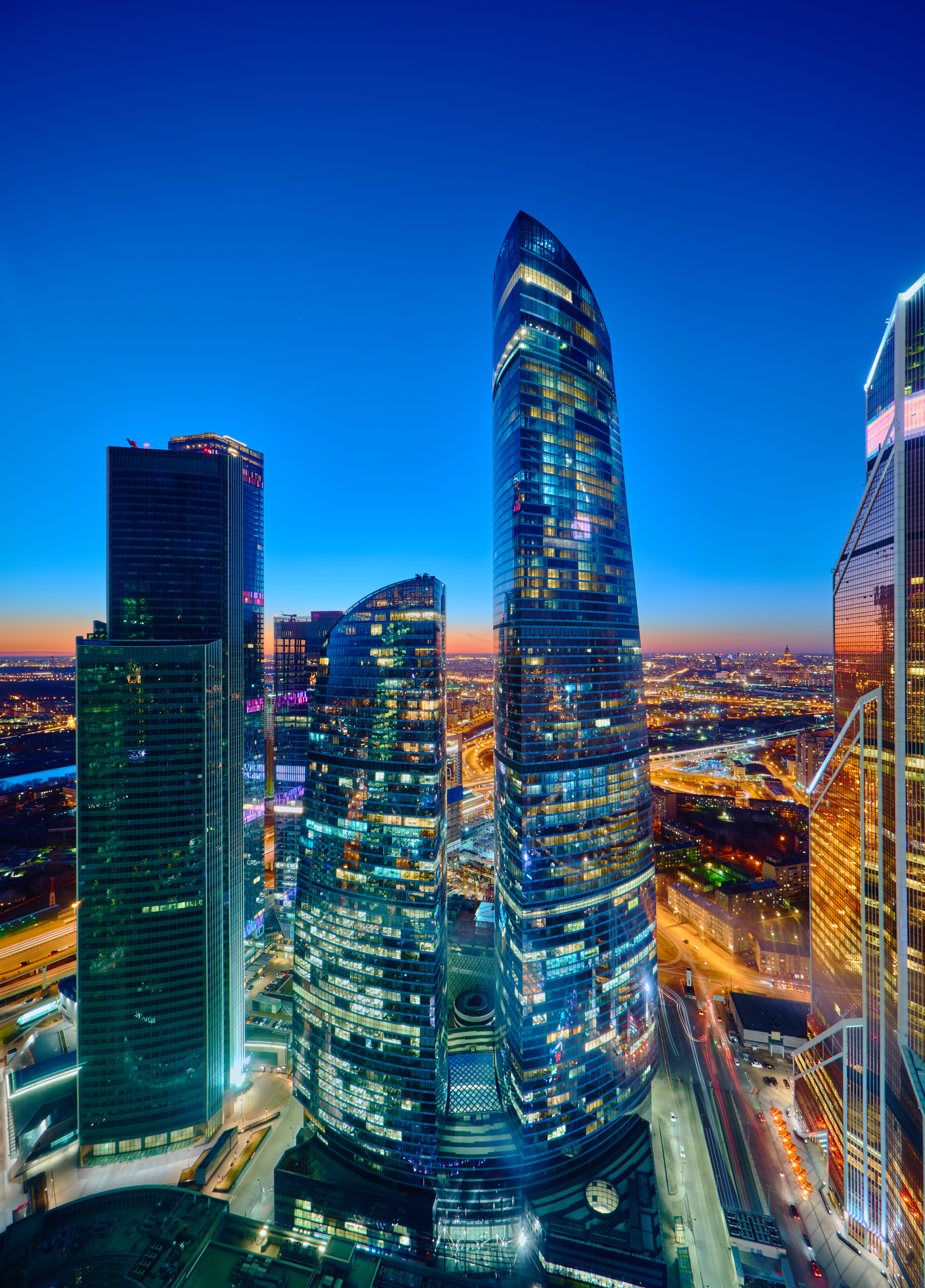 самое высокое жилое здание в европе